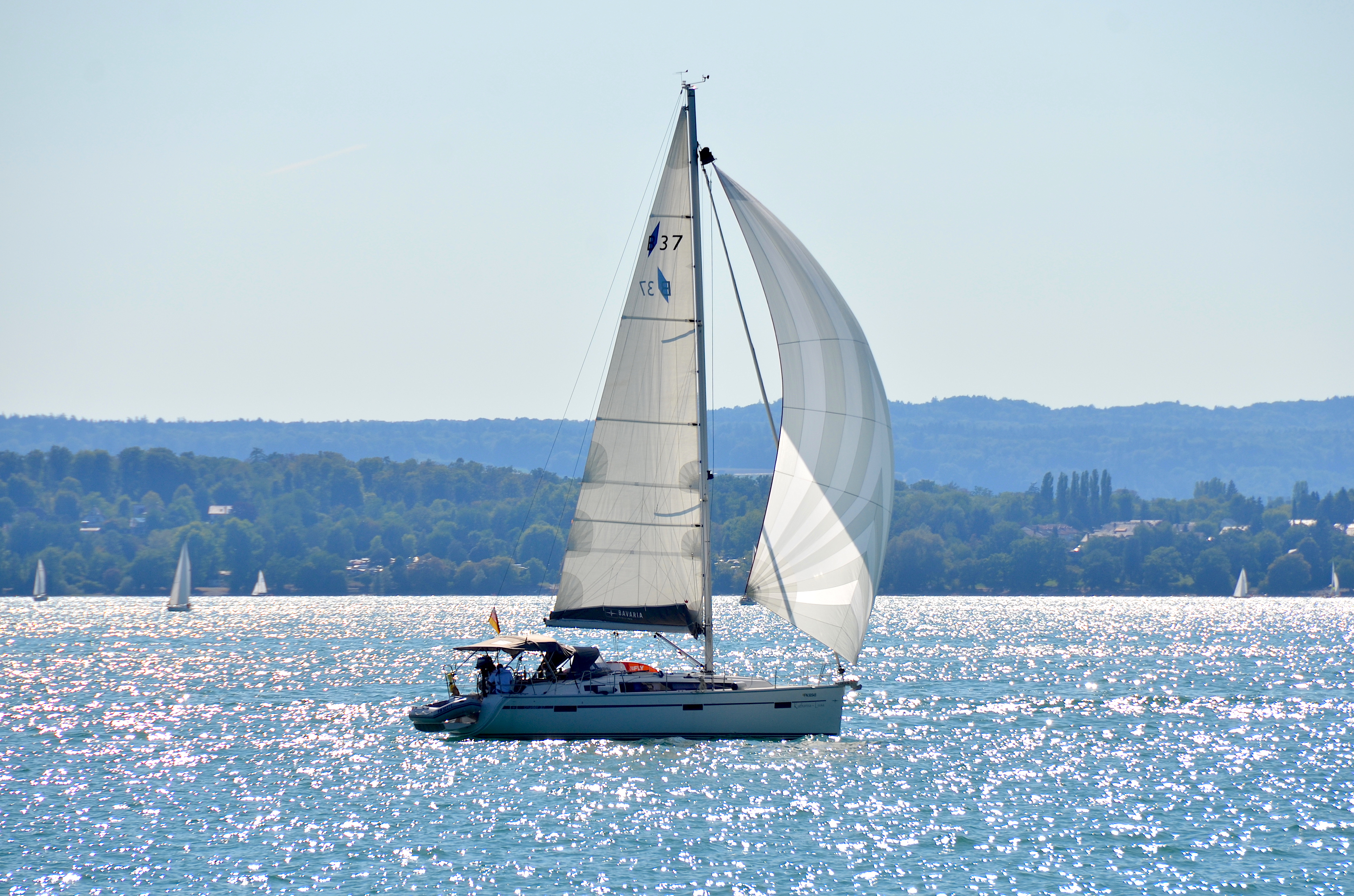 Bavaria Cruiser 37